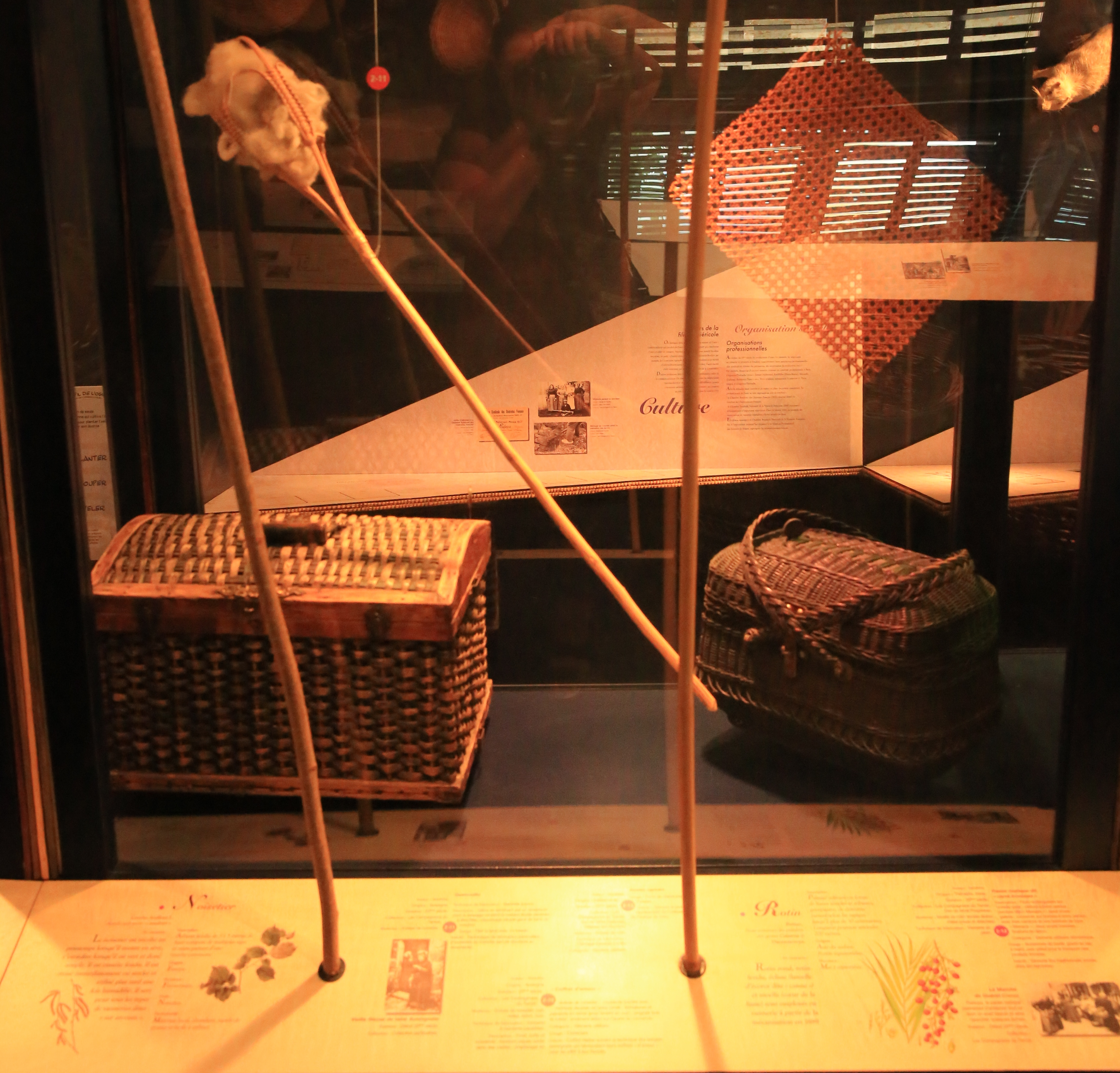 Musée de Villaines-les-Rochers : quenouille et coffret d'amour (Auvergne) en éclisse de noisetier ; panier rustique en rotin (Thierache, Aisne).